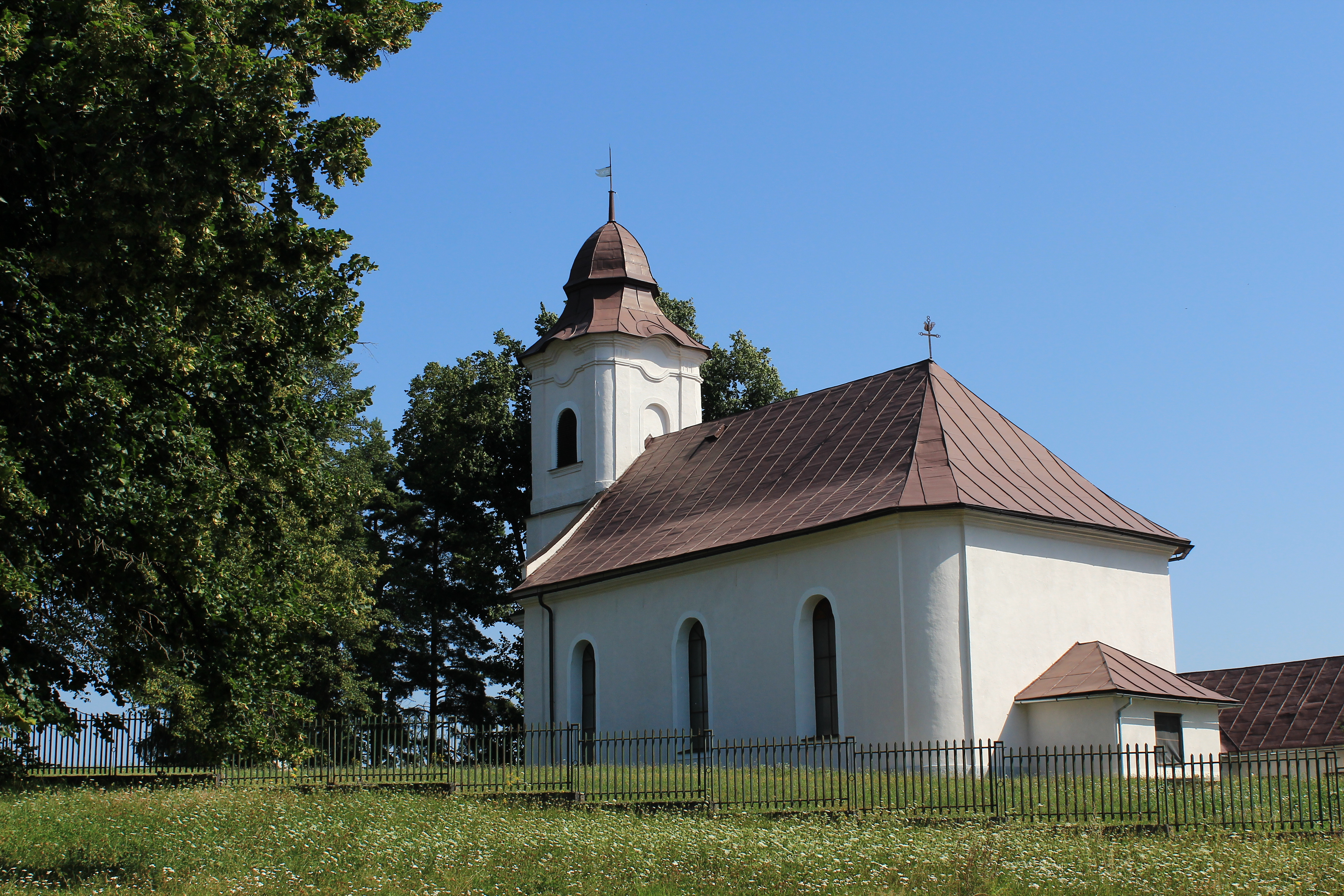 Hrochoť-kostol